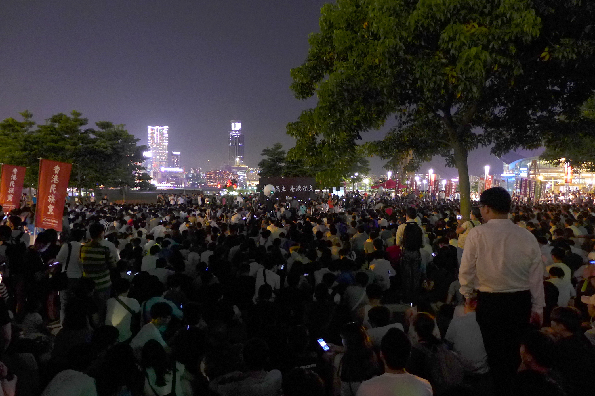 Hong Kong Independent Protest